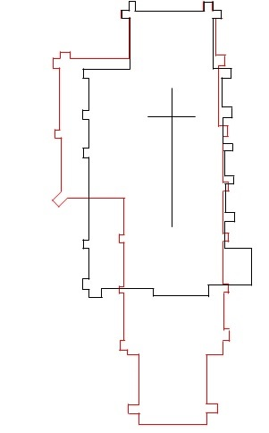 Eglise Dammard plan de masse post et après guerre 14-18